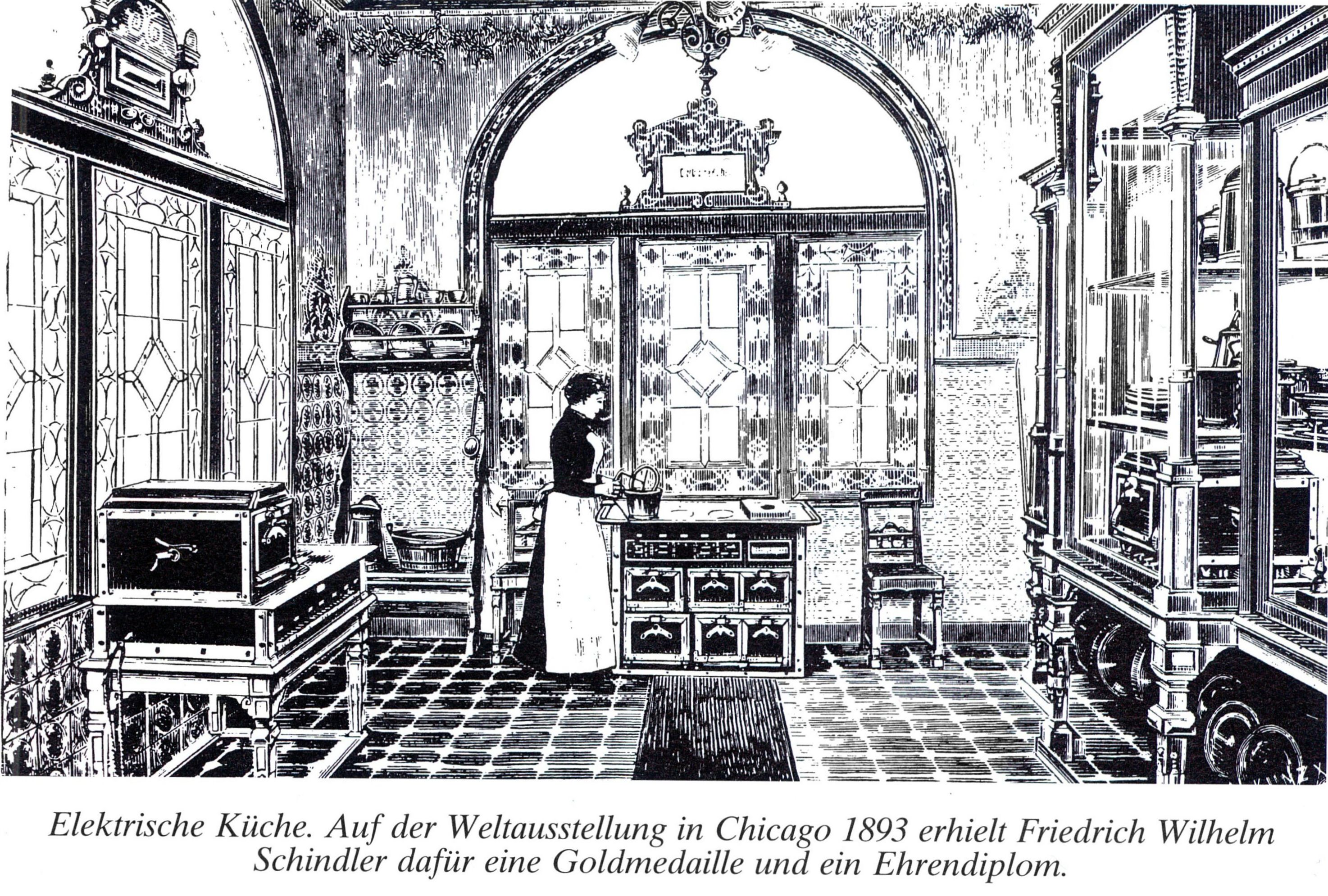 Friedrich Wilhelm Schindler geboren am 1. Juni 1856 in Mollis, Schweiz; gestorben am 19. November 1920 in Kennelbach, Österreich) war ein österreichischer Unternehmer und Erfinder. Außerdem war er der Neffe von Dietrich Schindler. Er stellte 1893 auf der Weltausstellung in Chicago die erste vollelektrische Küche vor und erhielt dafür eine Goldmedaille.